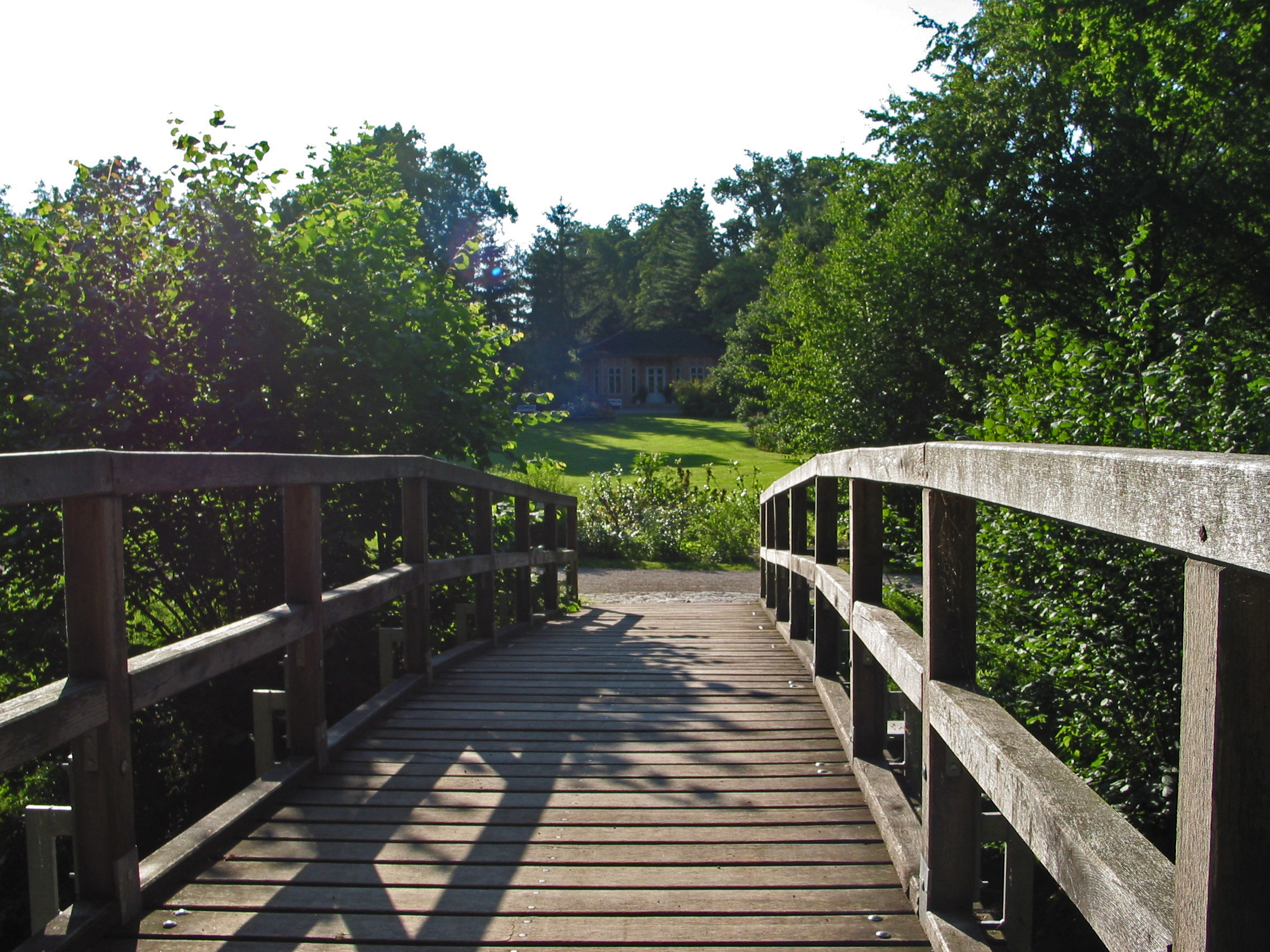 Auf der "Gelben Brücke" über die Ilm mit Blick zum Teehaus im Schlosspark Tiefurt (Weimar)